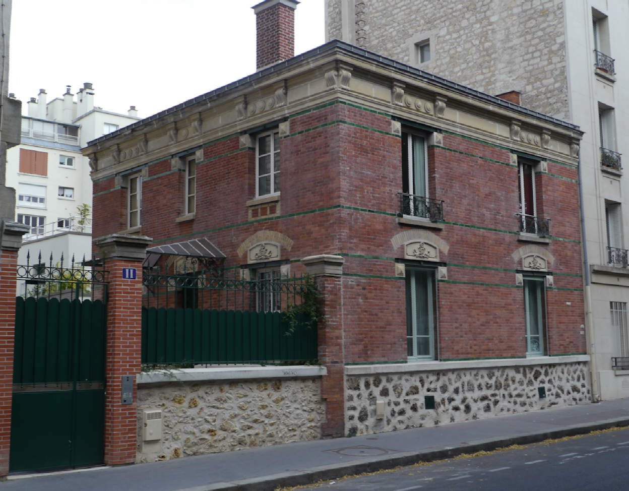 Ancienne maison de Coluche, située 11 rue Gazan à Paris (XIVe).